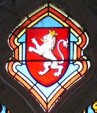 Armes olivier de Clisson ND du roncier